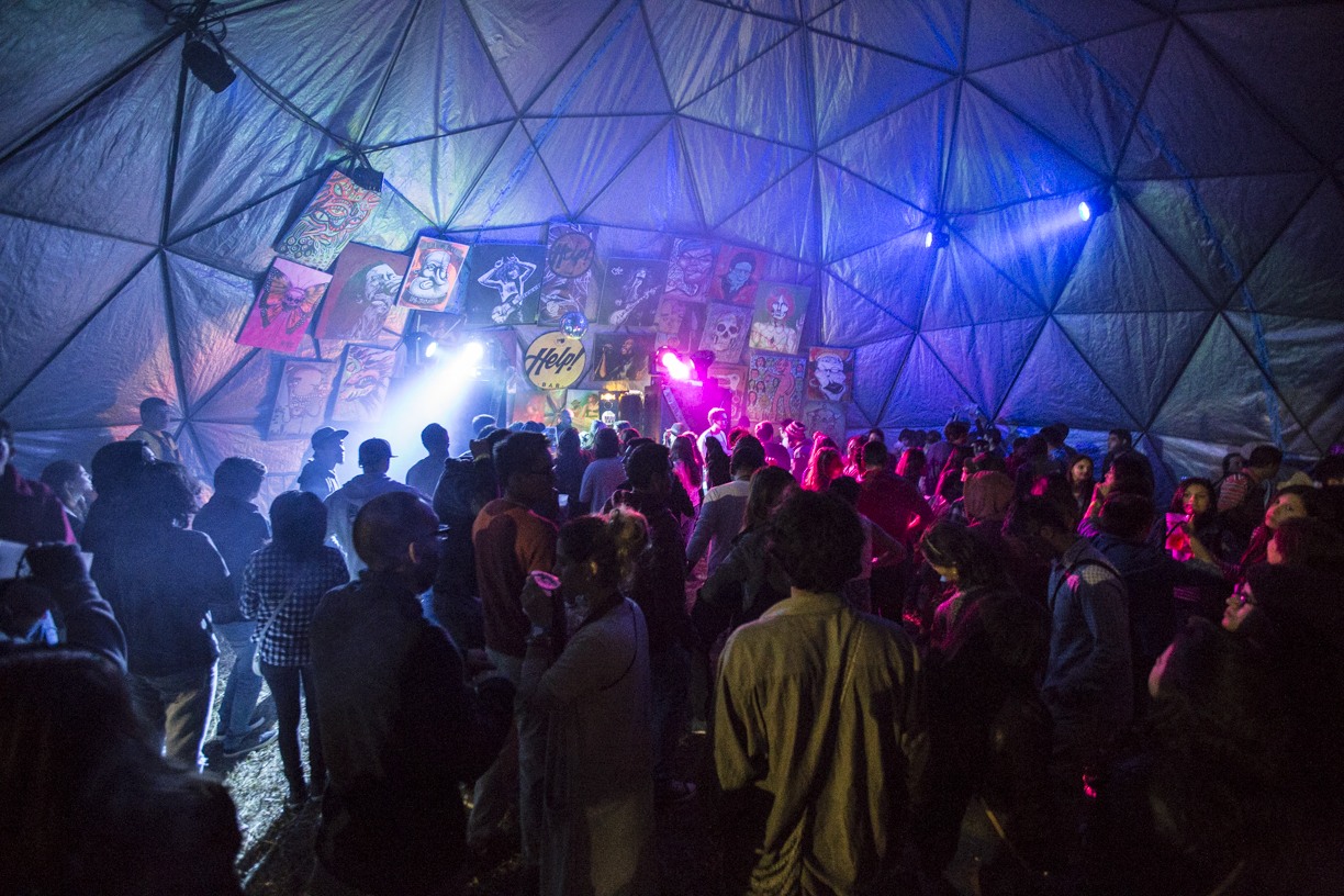 El Domo Help del Festival Selvámonos